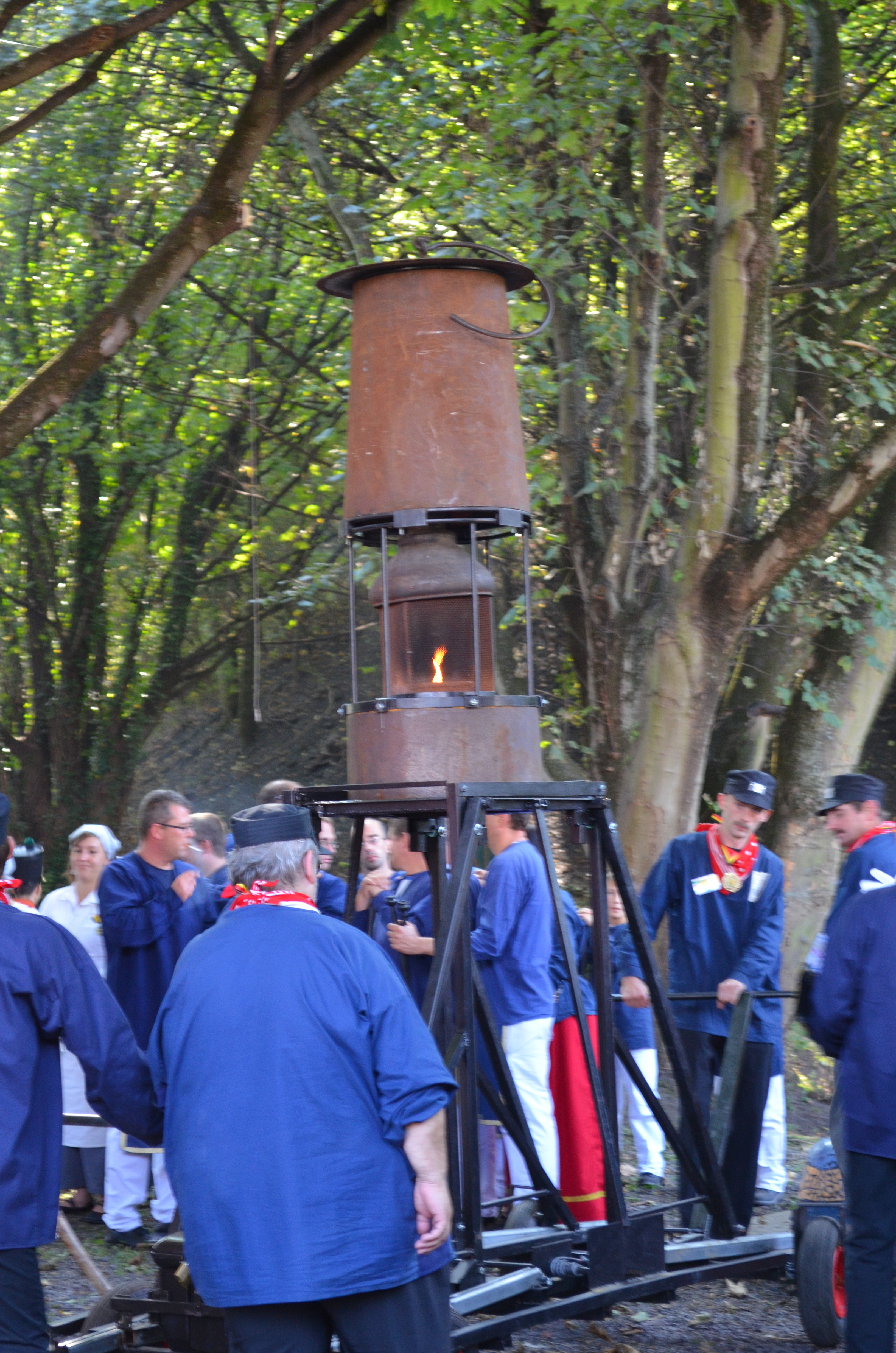 Dampremy (Charleroi - Belgique) - cortège de la Marsaude - parc du Crahwa - confrérie de la Marsaude